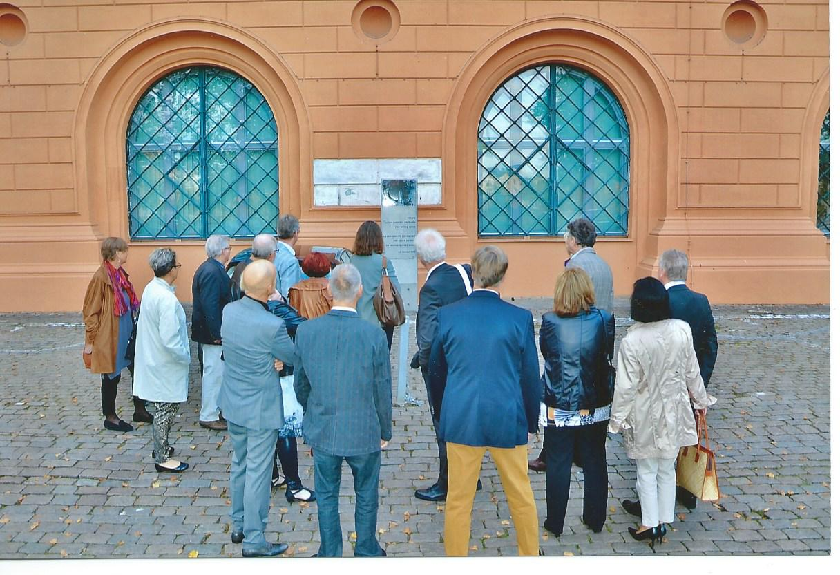 Tafel zum Gedenken der Montagsdemonstration am 23. Oktober 1989